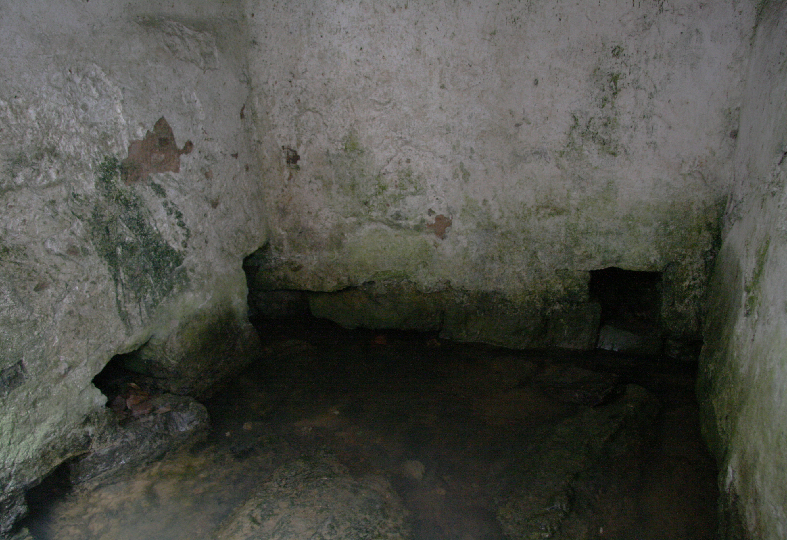 Fassung der Ahrquellen in Blankenheim